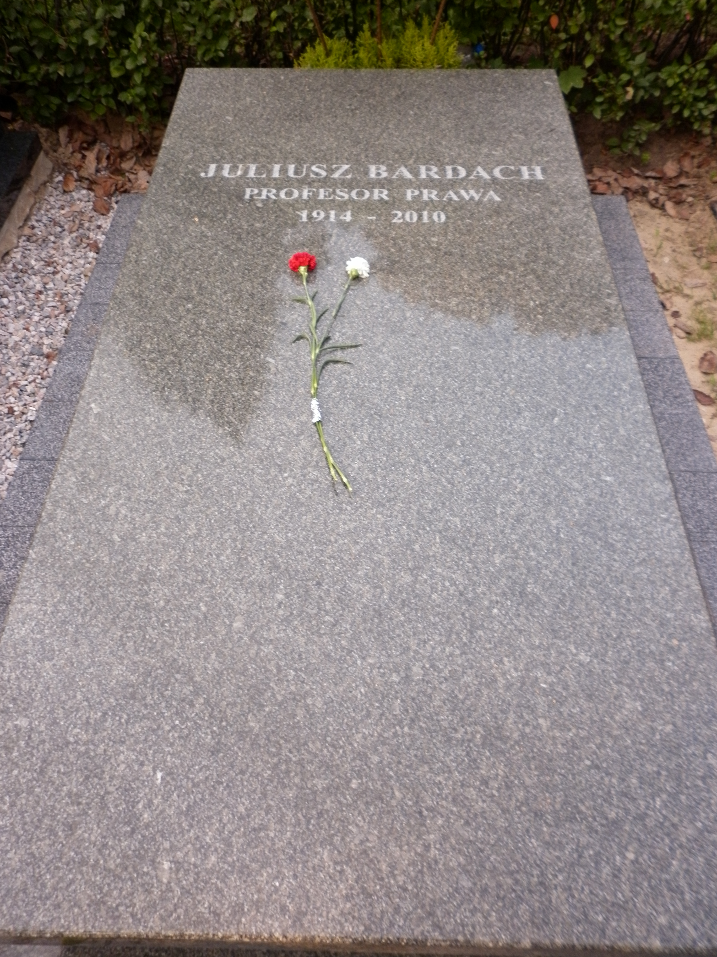 Grób Juliusza Bardacha na Wojskowych Powązkach